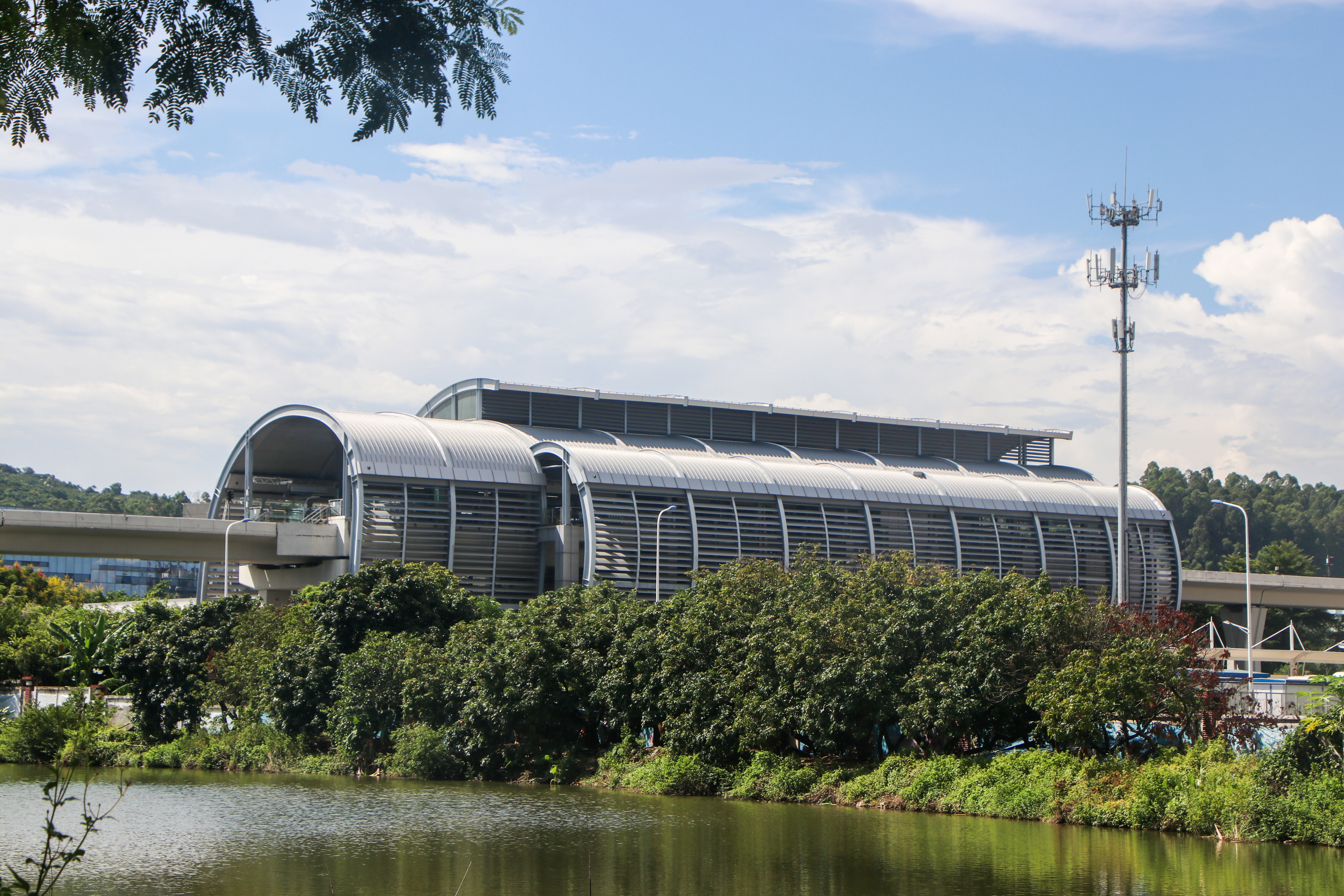 广州地铁蕉门站